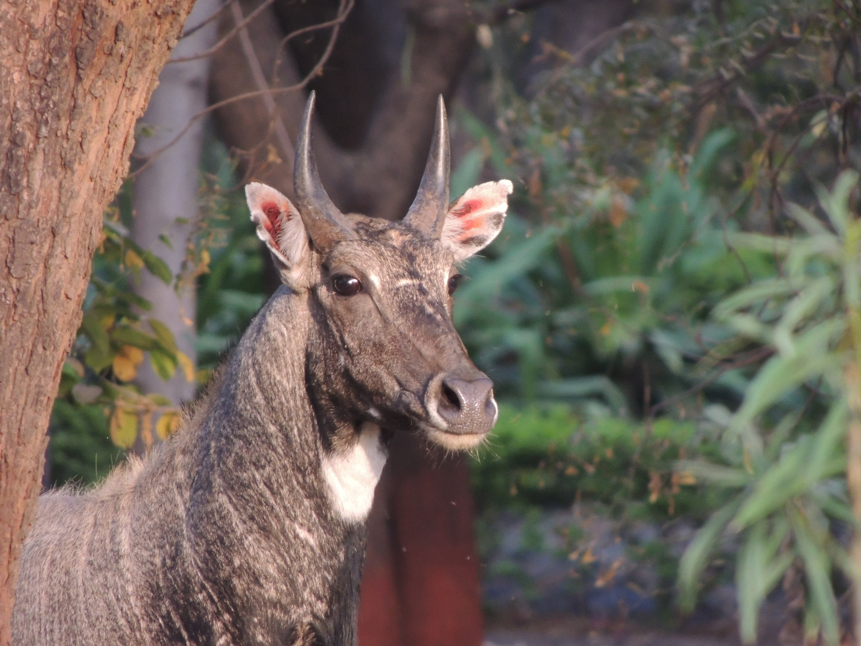 നീൽഗായ് നീലക്കാള